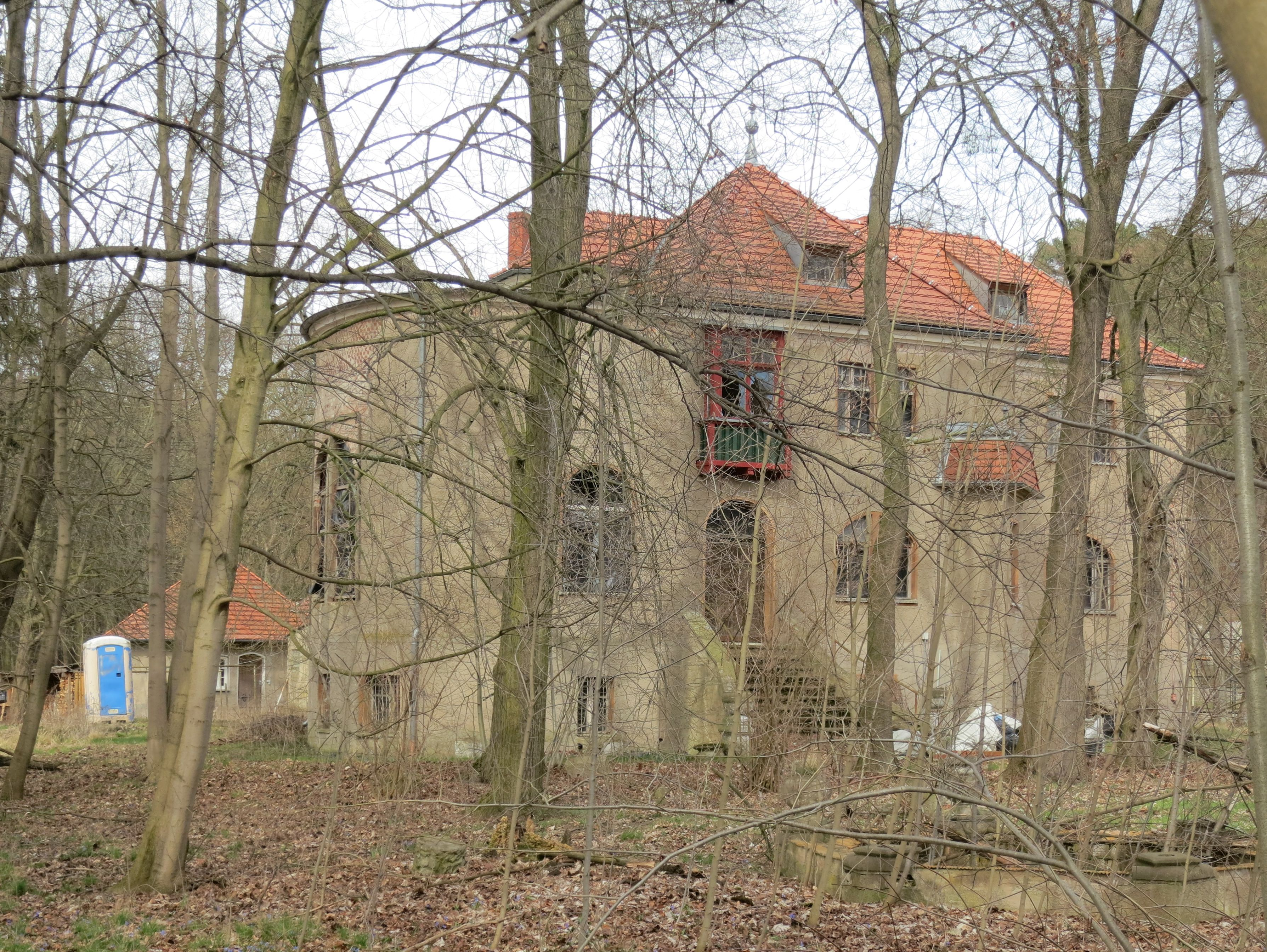 "Jagdidyll Berdotaris" bei Ahrensdorf (Gemeinde Nuthe-Urstromtal), in dem 1930 als Landwerk Ahrensdorf in einem Hachschara-Lager jüdische Jugendliche auf die Ausreise nach Palästina vorbeitet wurden. Haupthaus, Blick von Südosten.